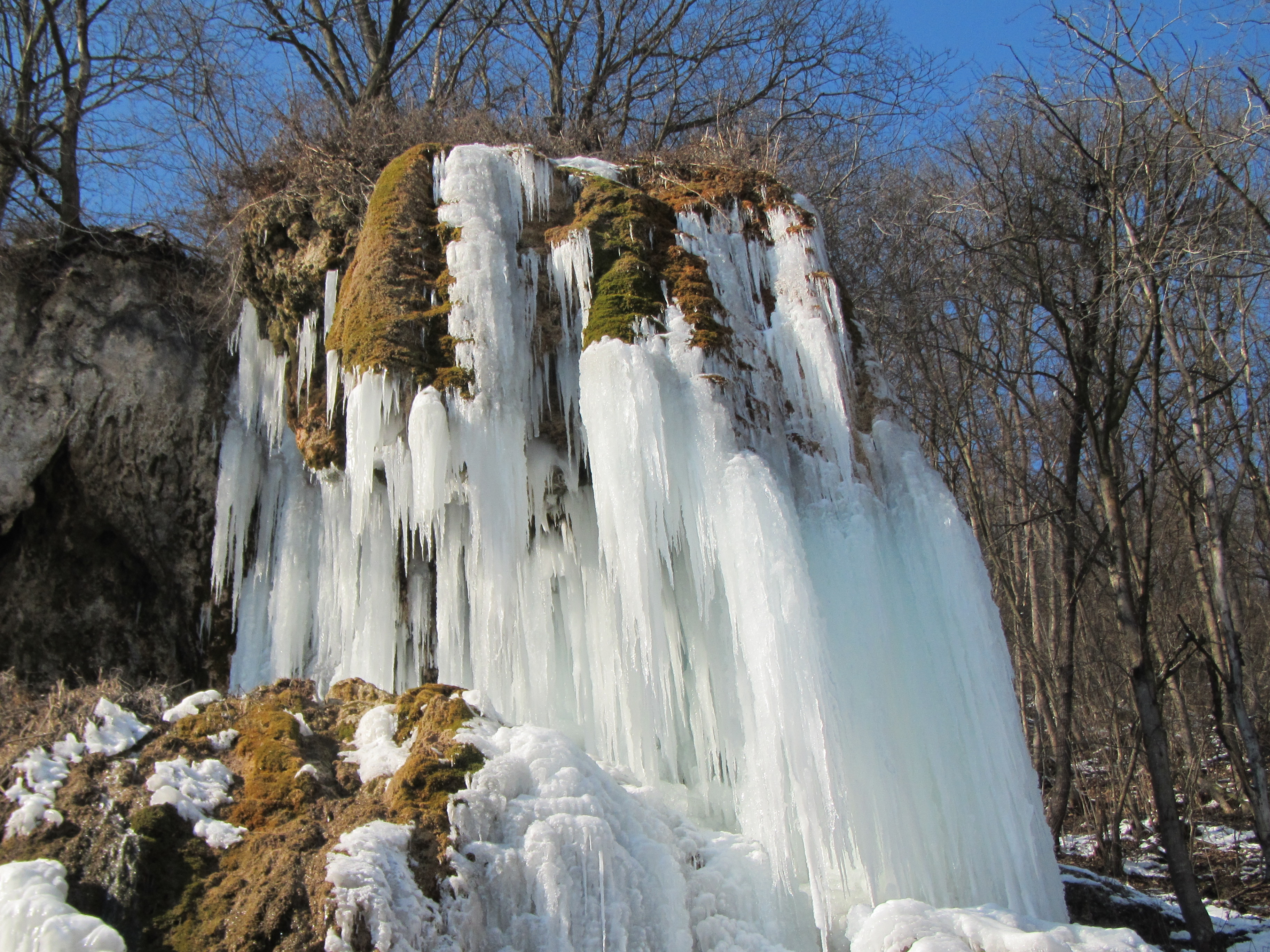 Водоспад "Дівочі сльози" біля с. Ісаків